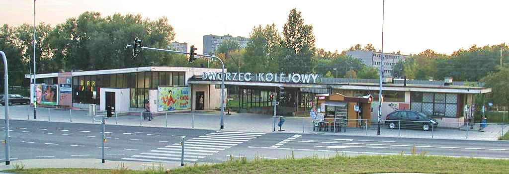 poprawiony kontrast